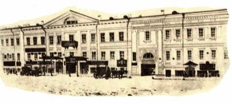 Дом Лепена на Малой Морской улице, где в 1833–1836 годах жил Гоголь. Акварель И. Баганца. Середина XIX в.